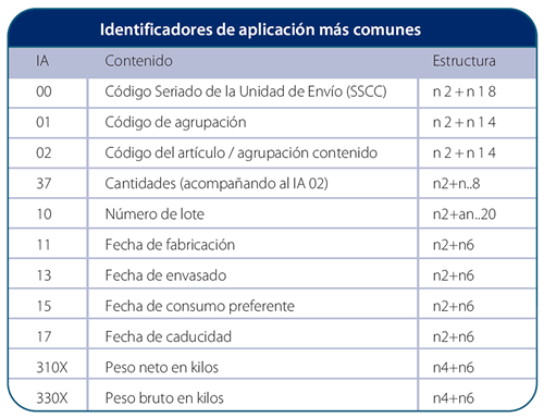 Resumen de Identificadores de Aplicación